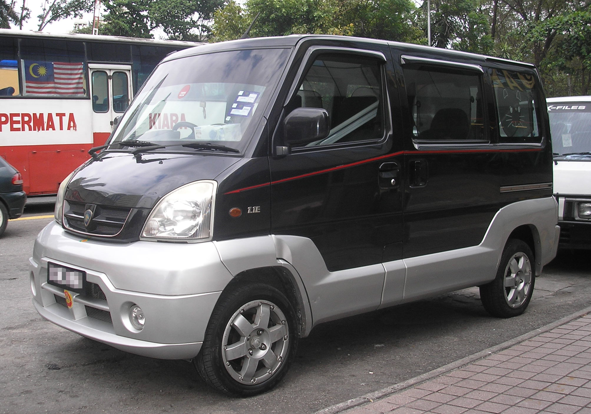 A Proton Juara in Kuala Lumpur, Malaysia.